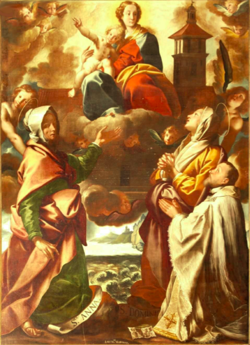 Sant'Anna, Santa Domenica e il rev. Gaudenzio Bovio, nella chiesa di Sant'Anna a Bellinzago Novarese (1629 ca)